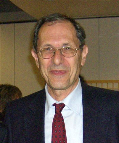 Photograph showing Peter Illes, pharmacologist, * 1942